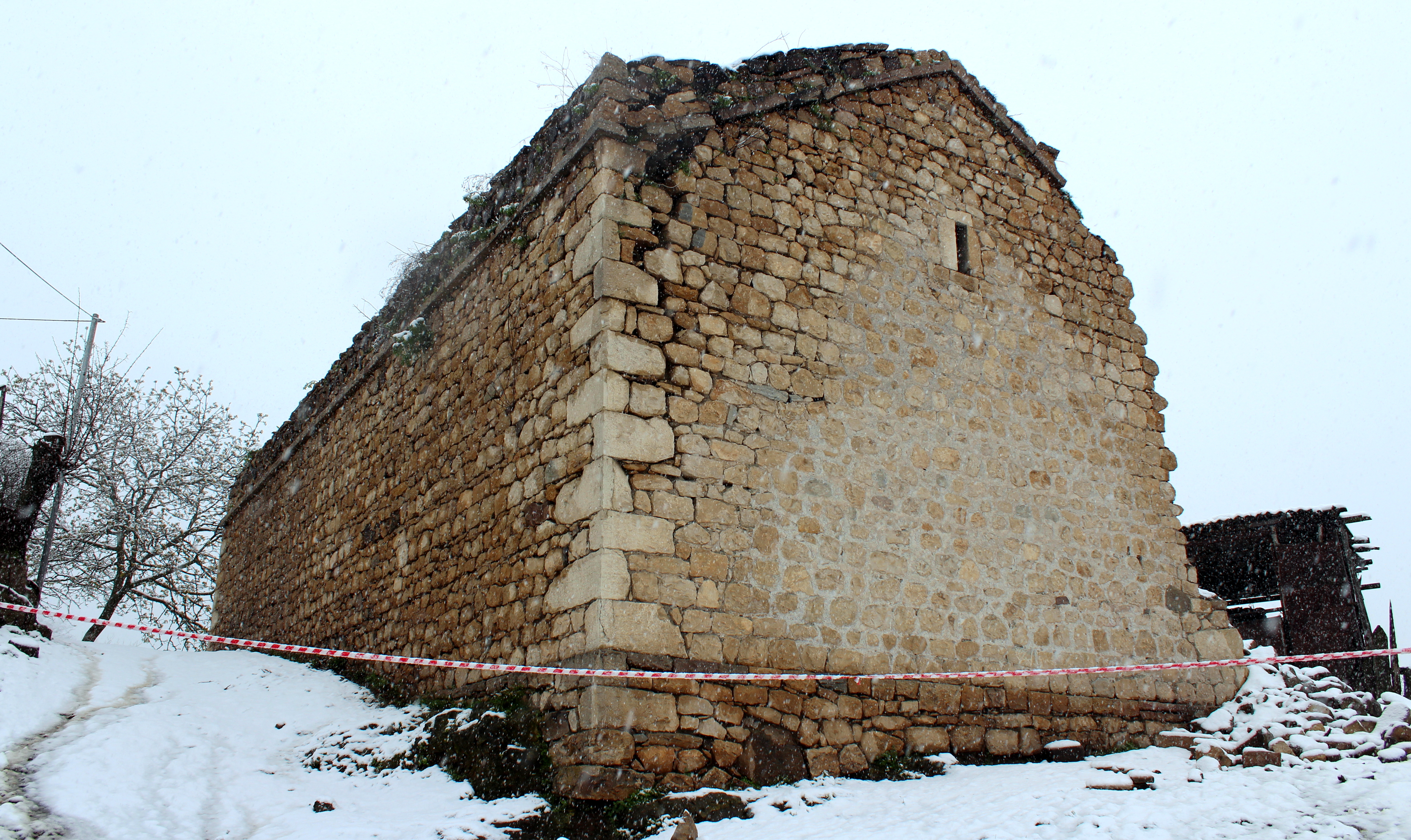 Եկեղեցի Խդրանց գյուղում, փլուզվել է 2019 թվականի ապրիլի 20-ին